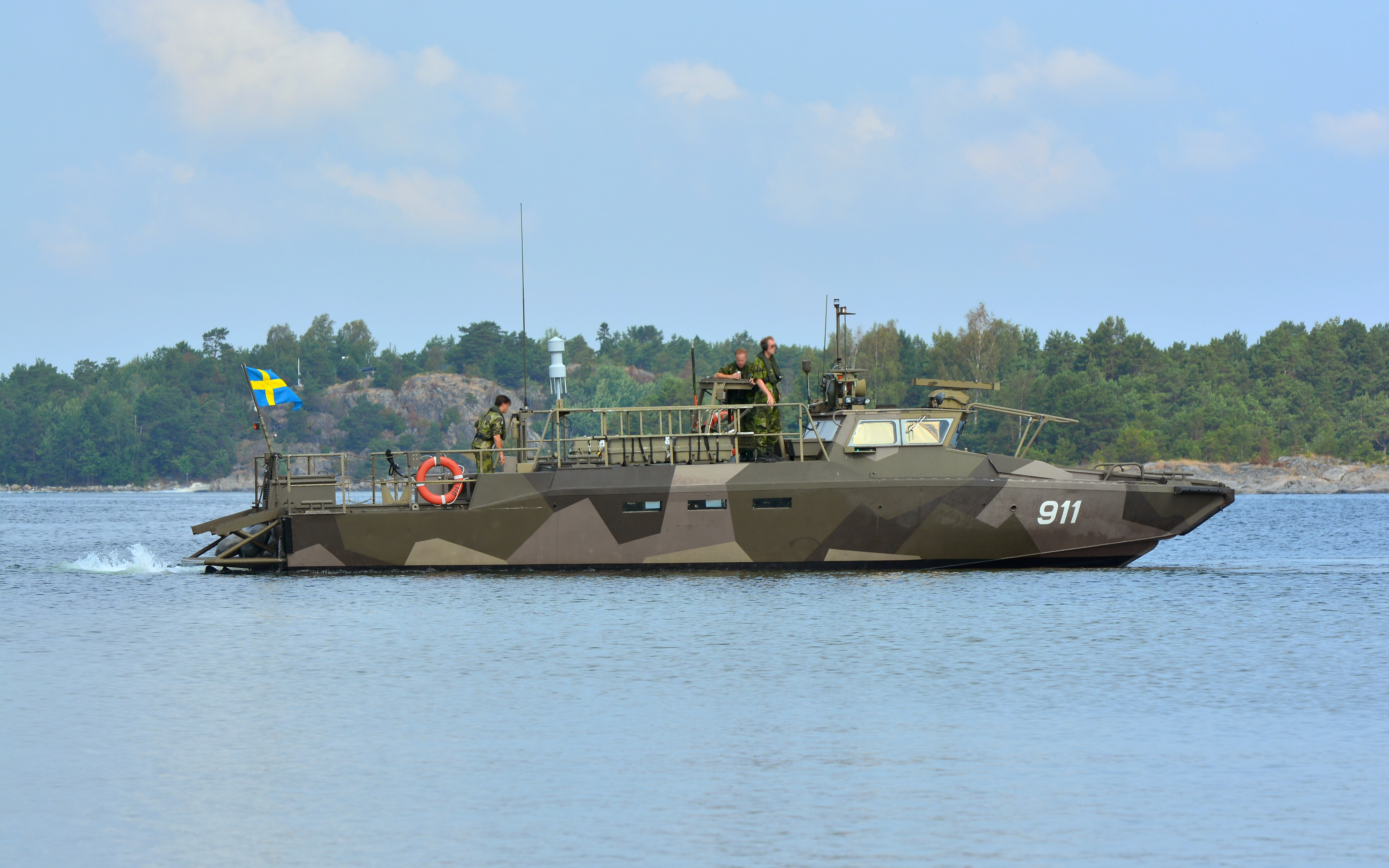 En Stridsbåt 90 i Östemarsfladen på Nåttarö i Stockholms skärgård.